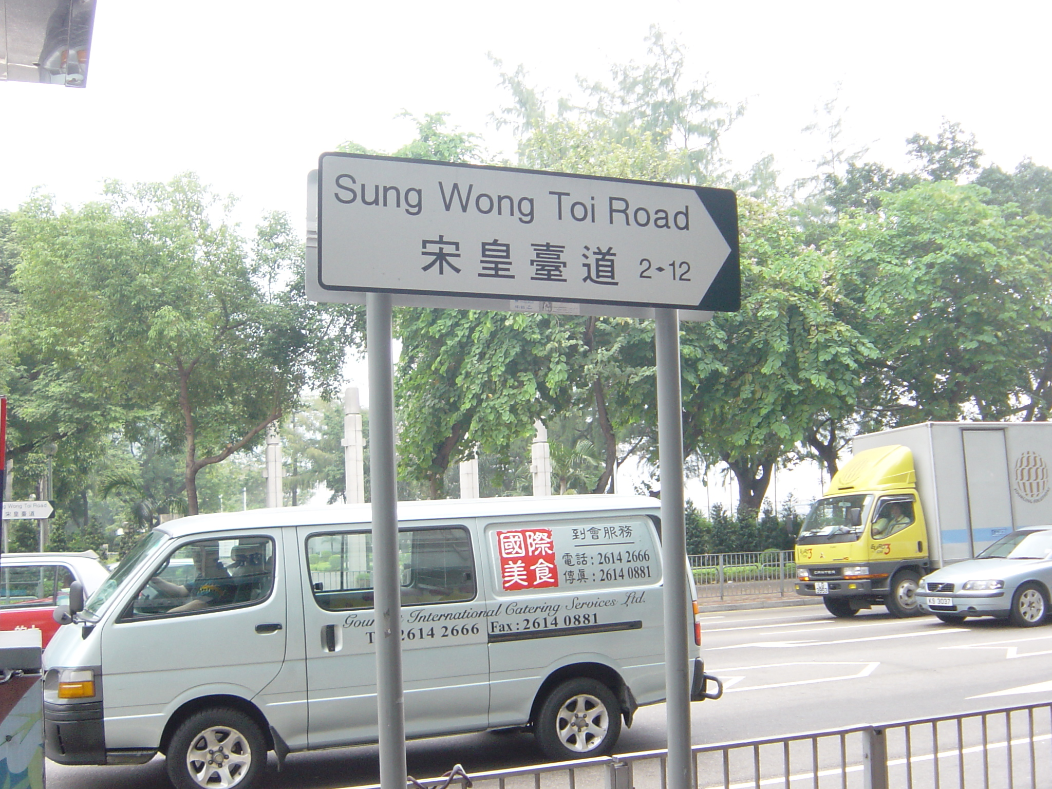 香港宋王臺花園外的宋皇臺道。Sung Wong Toi, Hong Kong.